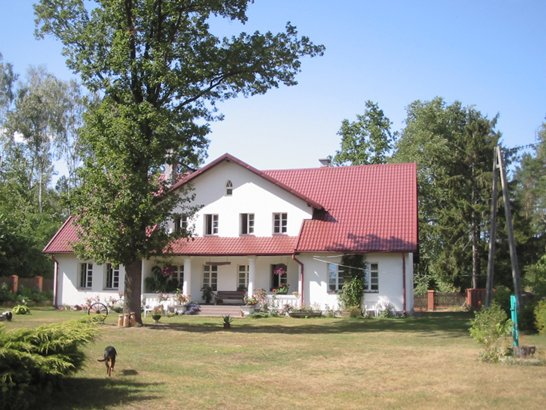 Leśniczówka Lisie Jamy